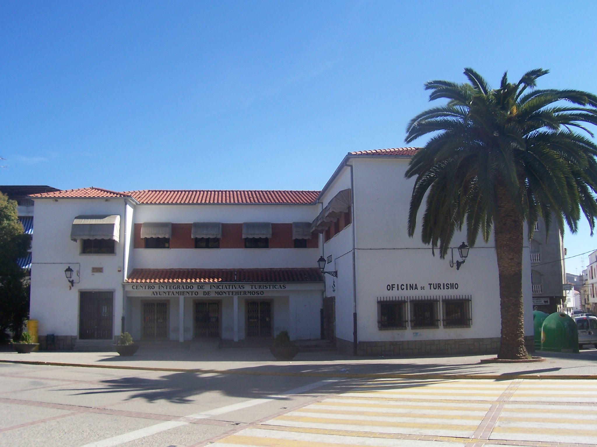 Centro de Iniciativas Turísticas (más conocido como teleclub) de Montehermoso, Cáceres, España.